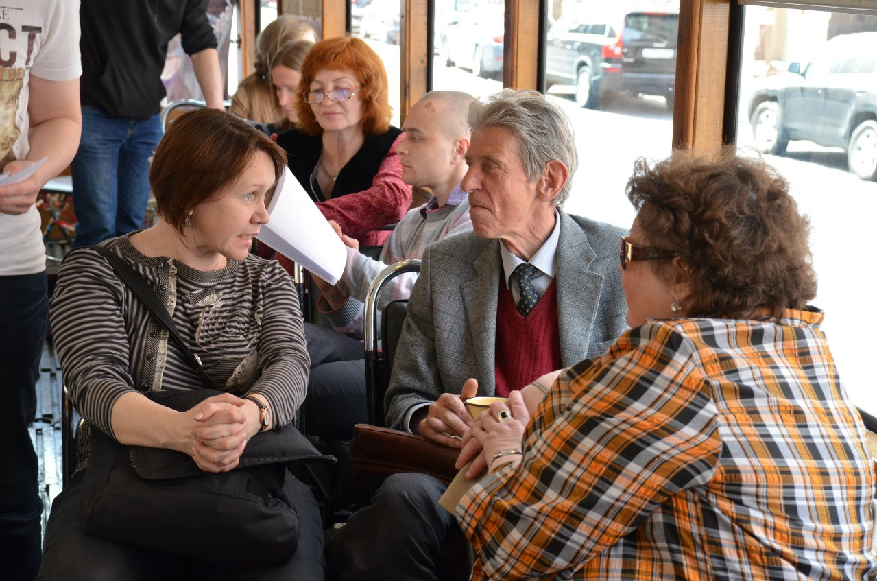 Творческая поездка в музейном трамвае ЛМ-49 27 мая 2012 года с участием Бориса Аверина.